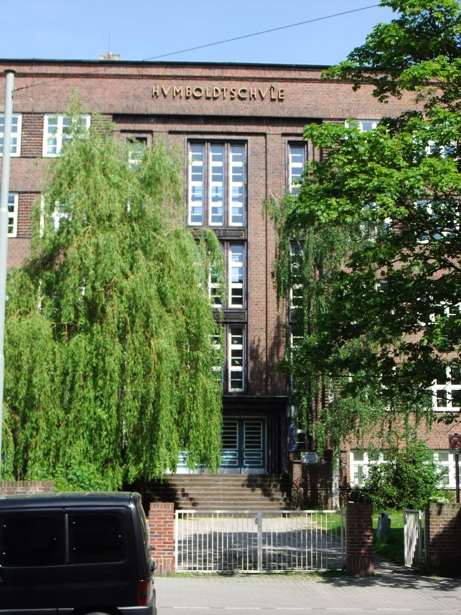 Humboldtschule in Bremerhaven, Schillerstraße 87. Das abgebildete Objekt ist ein geschütztes Kulturdenkmal in der Freien Hansestadt Bremen, mit der Nr. 1643 beim Landesamt für Denkmalpflege registriert.